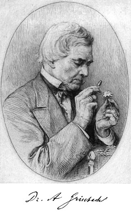 Август Генрих Рудольф Гризебах